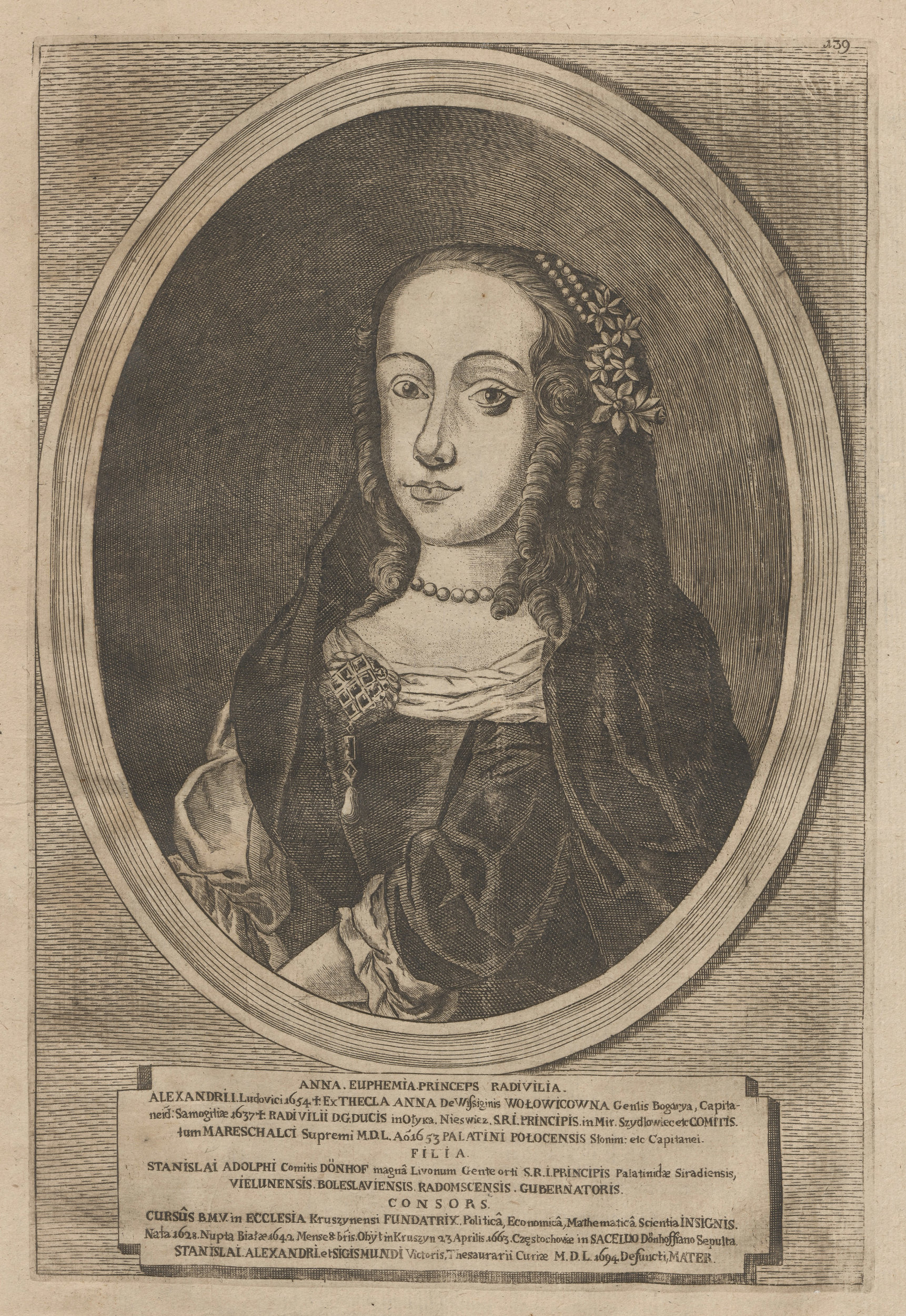 Партрэт Ганны Яўхіміі з Радзівілаў, дачкі Аляксандра Людвіка РадзівілаБеларуская (тарашкевіца): Партрэт Ганны Яўхіміі Дэнгаф (Hanna Jaŭchimija Denhaf) з роду Радзівілаў (Radzivił)